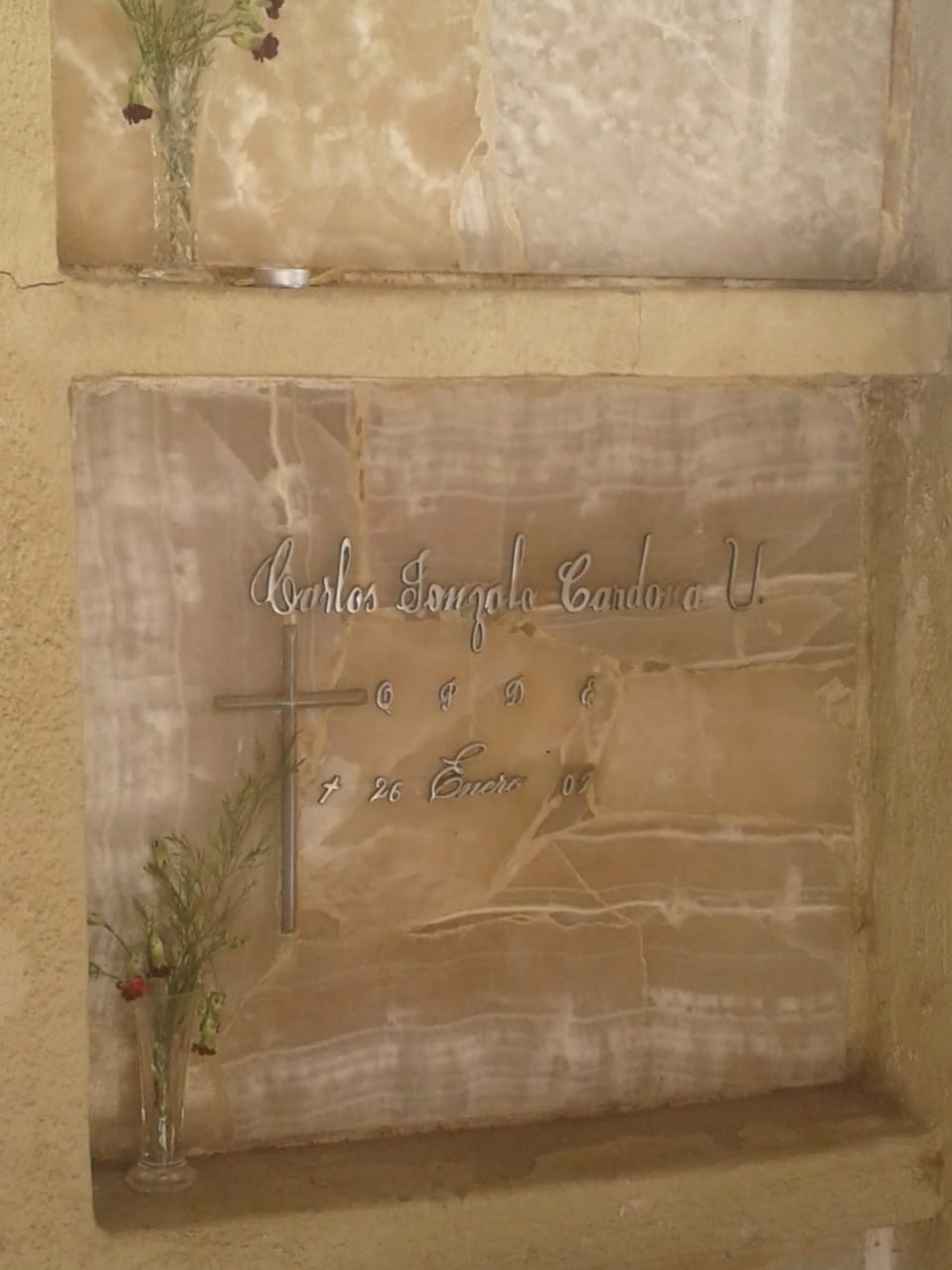 dentro del mausoleo